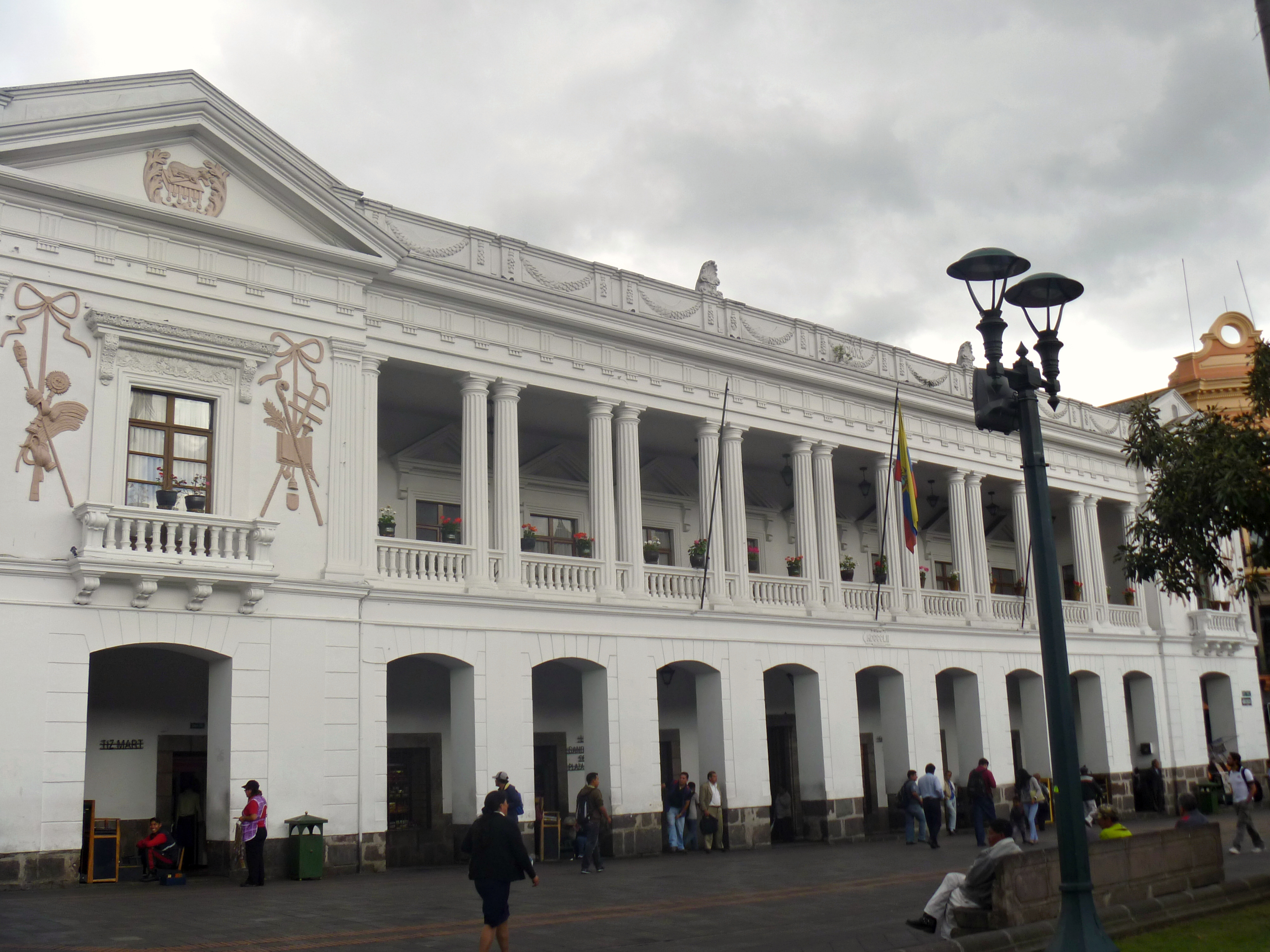 Palacio Arzobispal de Quito. Edificio histórico de la ciudad de Quito DM, que alberga las oficinas de la Arquidiocesis de Quito y Primada de Ecuador.